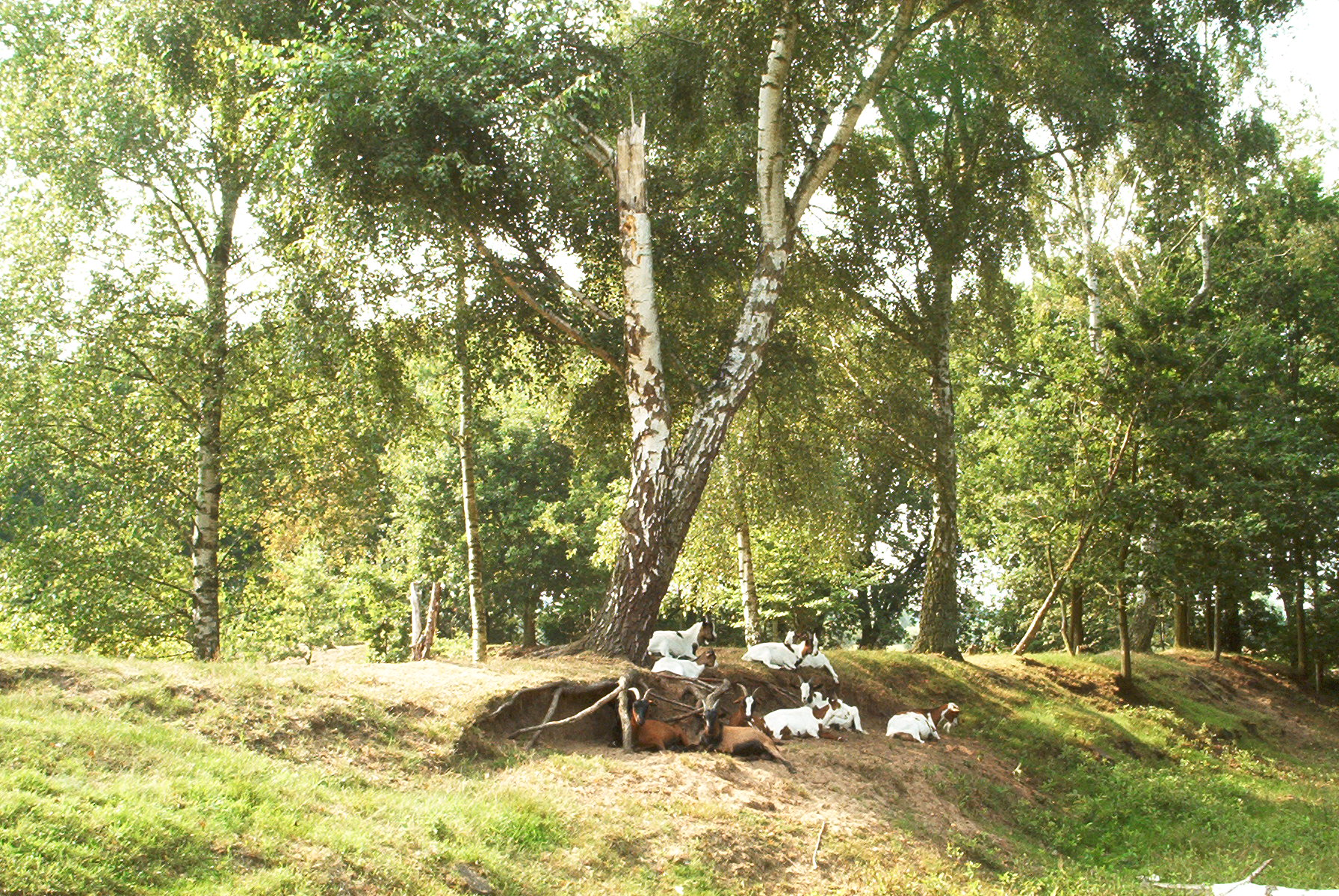 Schobbejakshoogte Ryckevelde.